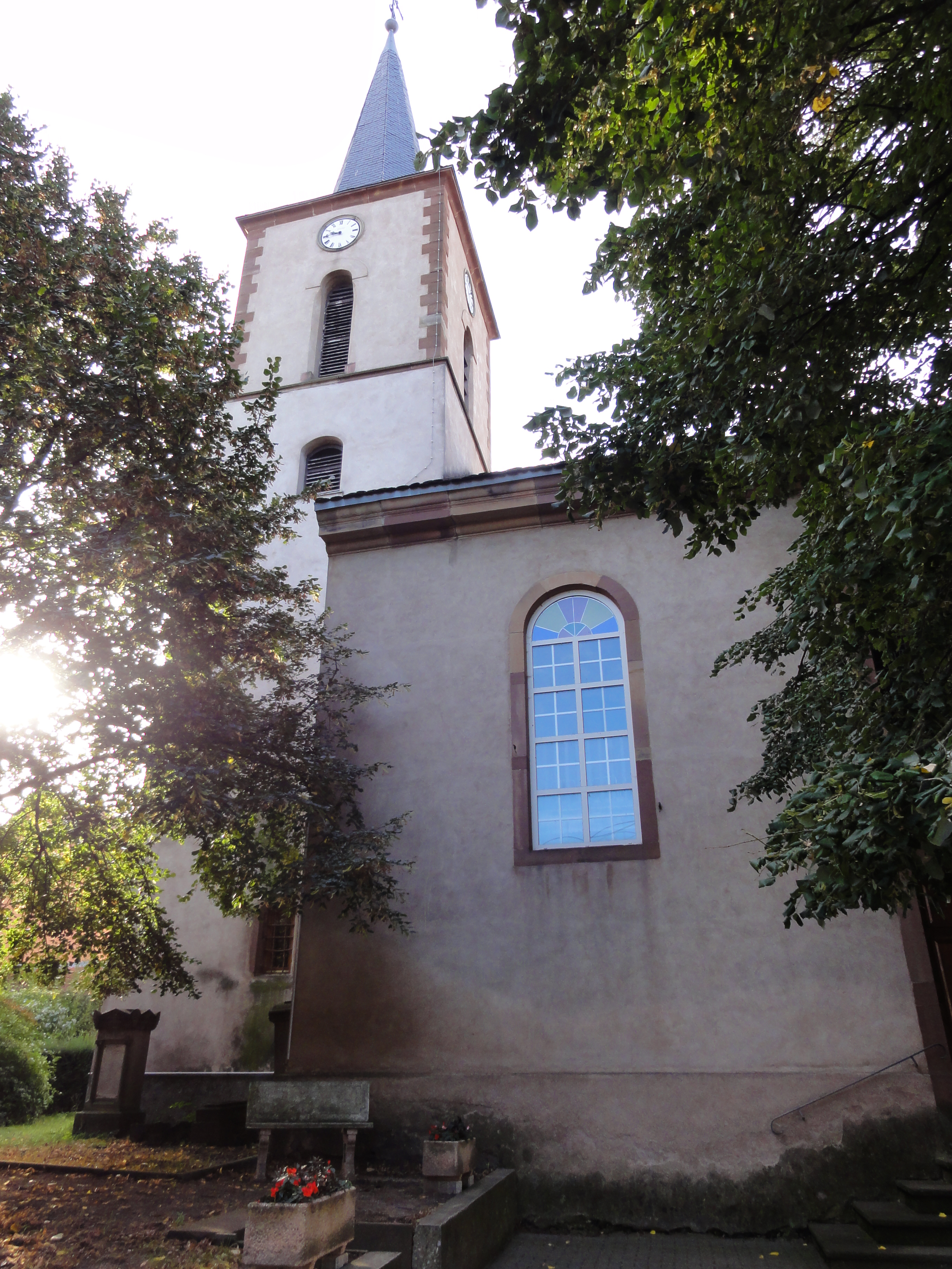 Alsace, Bas-Rhin, Église protestante de Furdenheim (IA67005538).